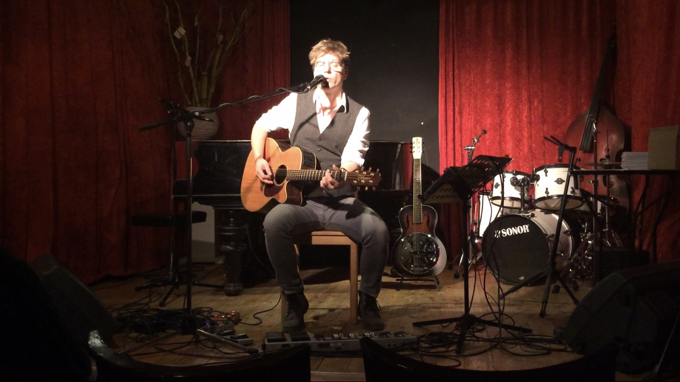 Pivo Deinert Live 2018